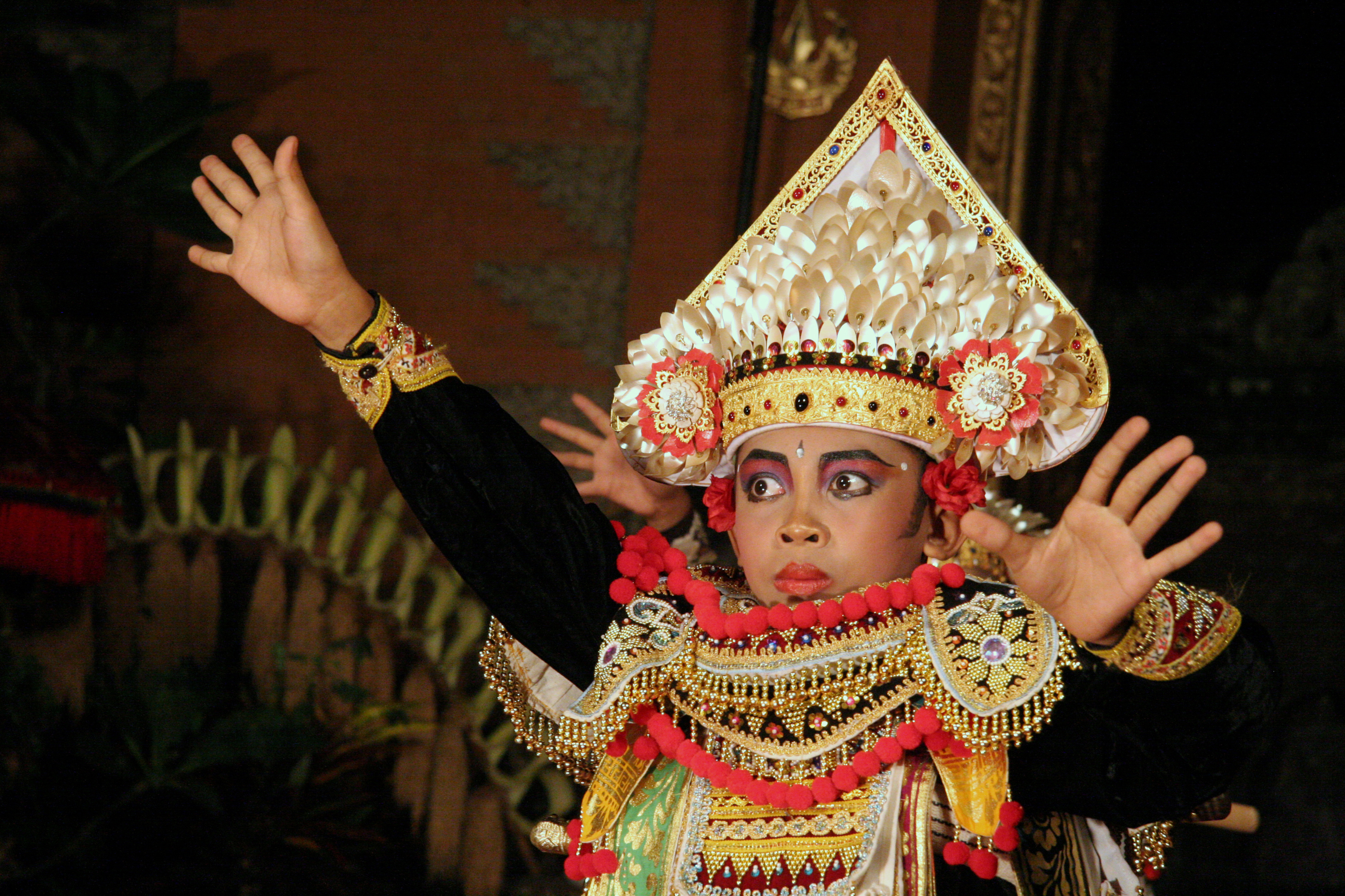 Bali Ubud Jeune danseur